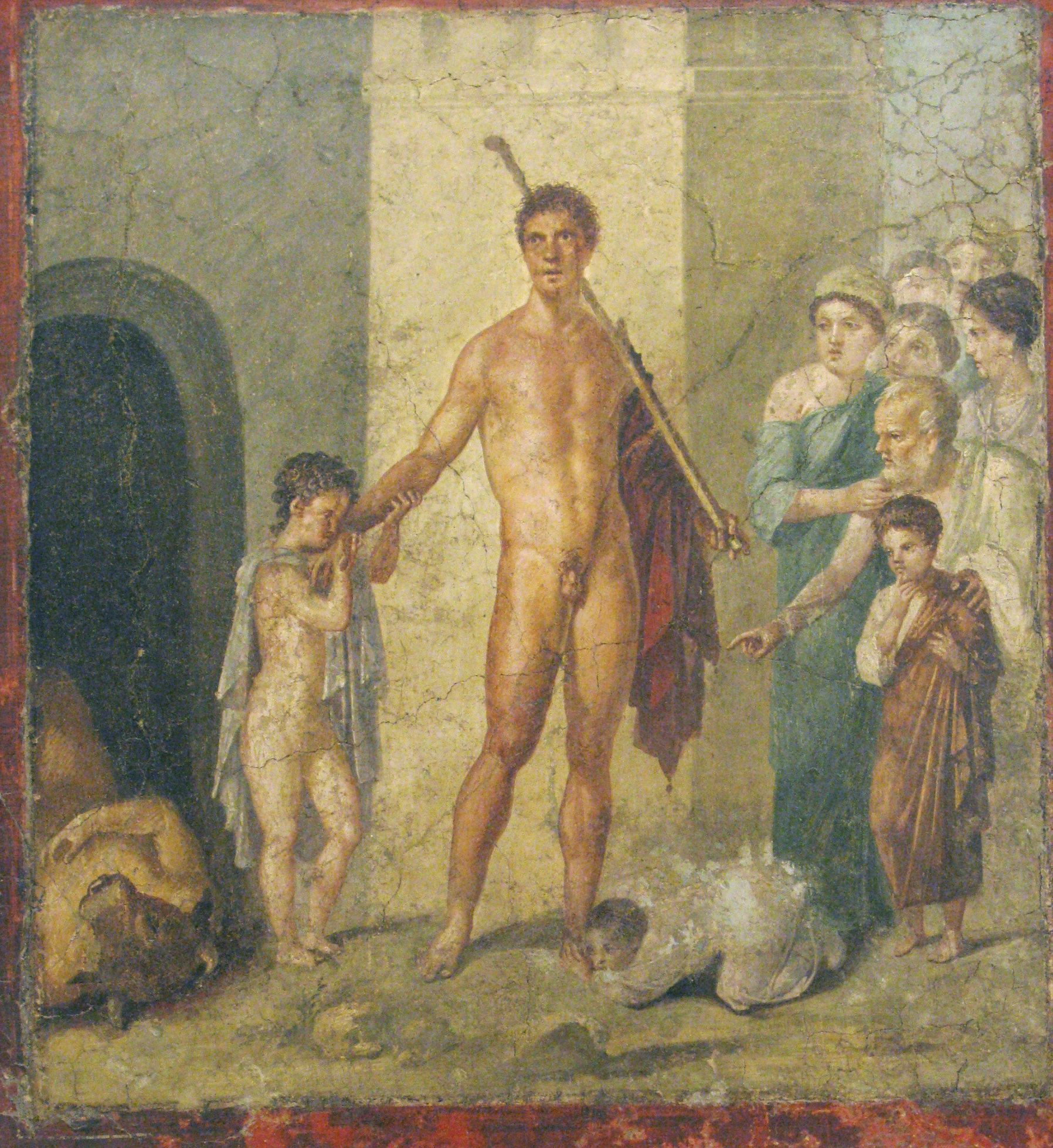 Teseo liberatore, Museo archeologico nazionale di Napoli, (inv. nr. 9043). Da Pompei, Casa di Gavius Rufus. Teseo ha appena ucciso il minotauro riverso a terra nell' ingresso del labirinto, e viene ringraziato dai giovinetti ateniesi destinati a finire in pasto al mostro, mentre sulla destra il popolo cretese assiste sorpreso all'evento.